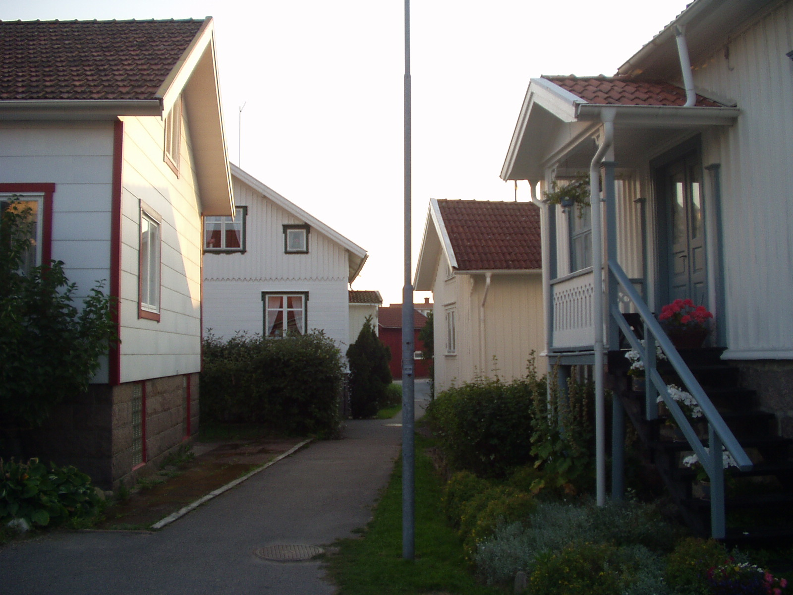 Beskrivning: Mollösund Juli 2005 Fotograf: Kristian Persson (jag själv)